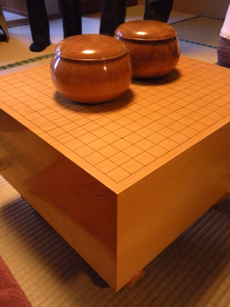 goban, bowls